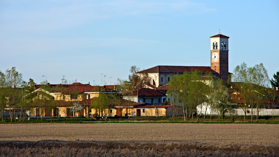 Veduta di Borgolavezzaro (NO)